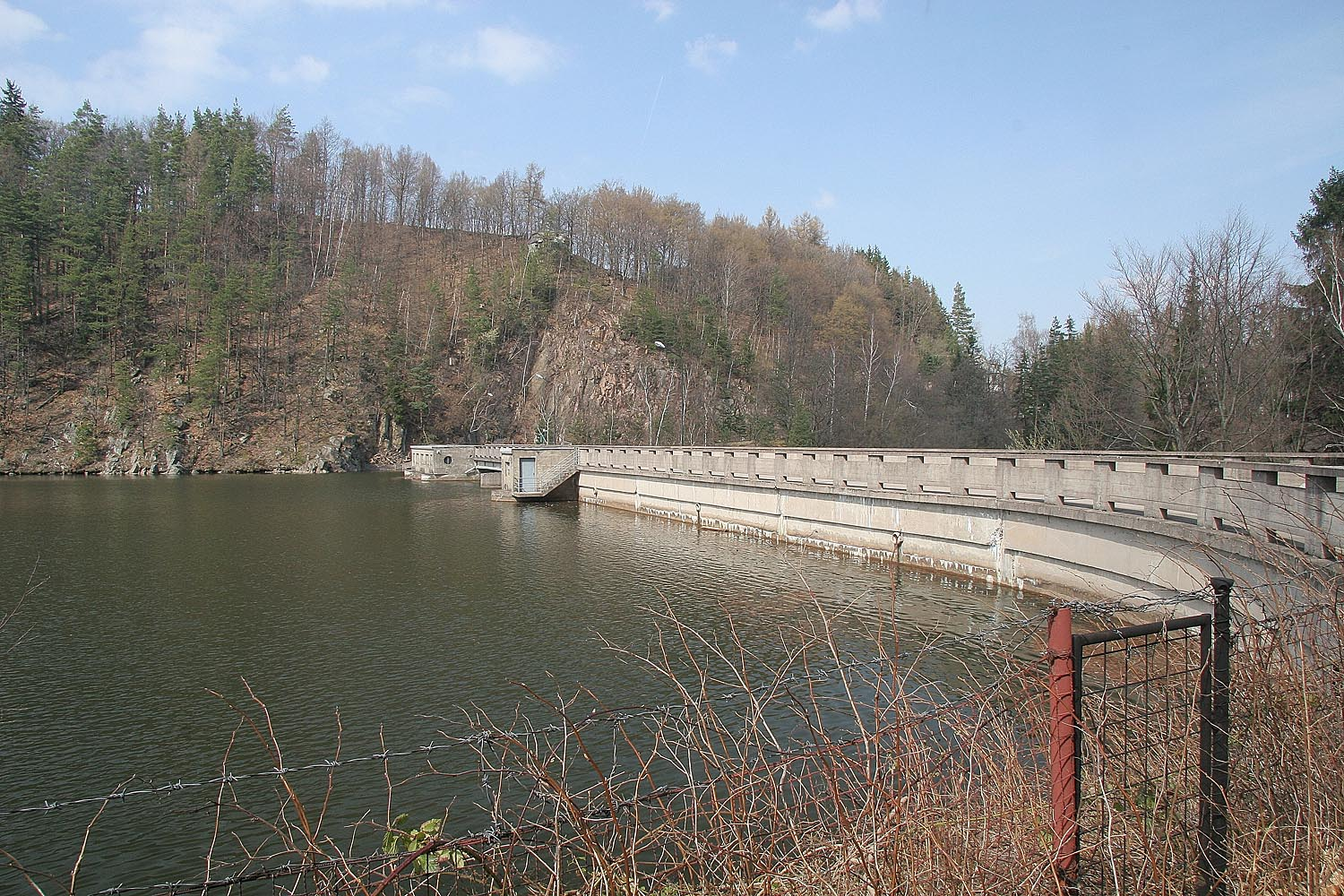 Dam Křižanovice, district Chrudim, Czech Republic autor: Prazak date: 1. 4. 2007